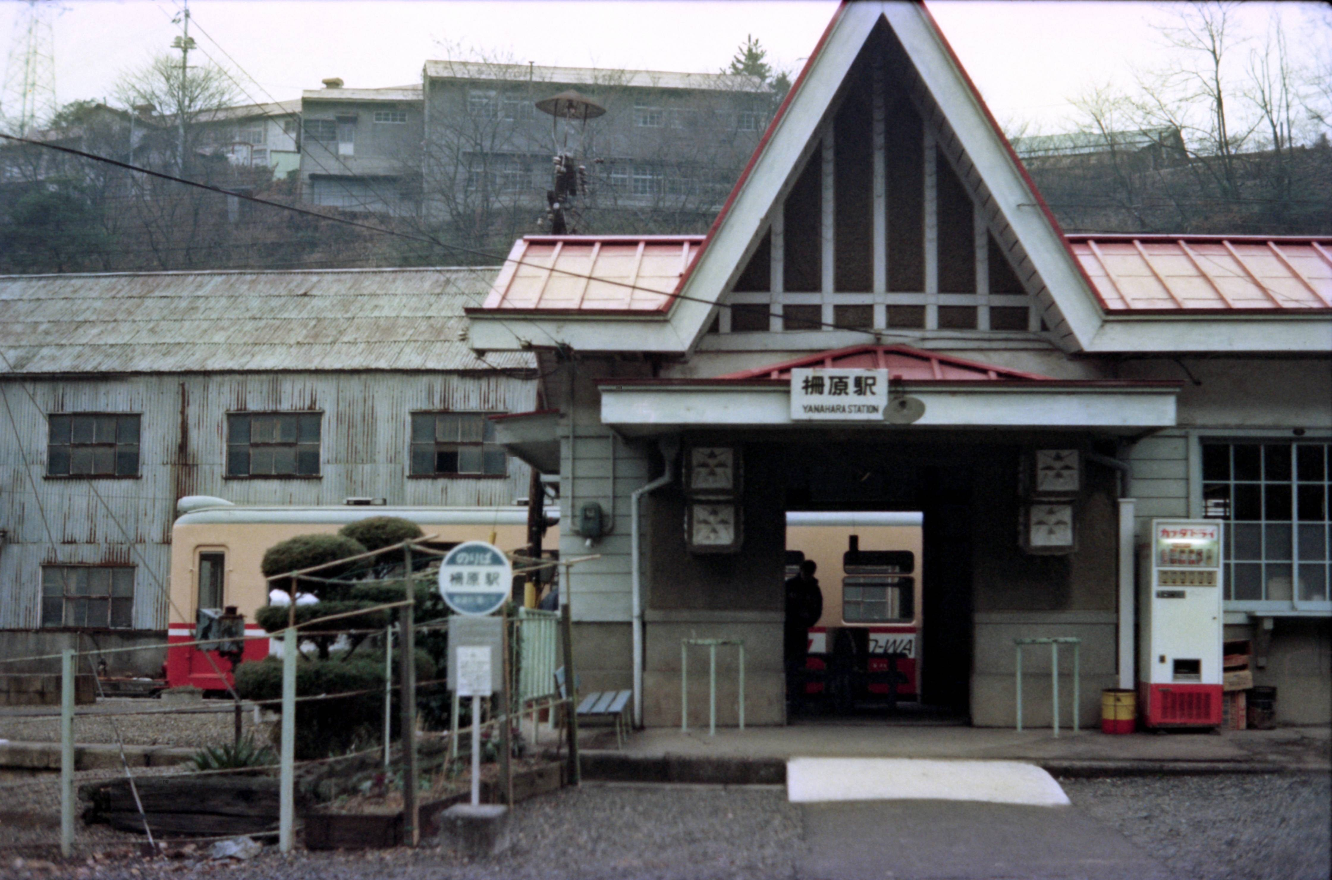 片上鉄道 柵原駅 Ｓ５６？